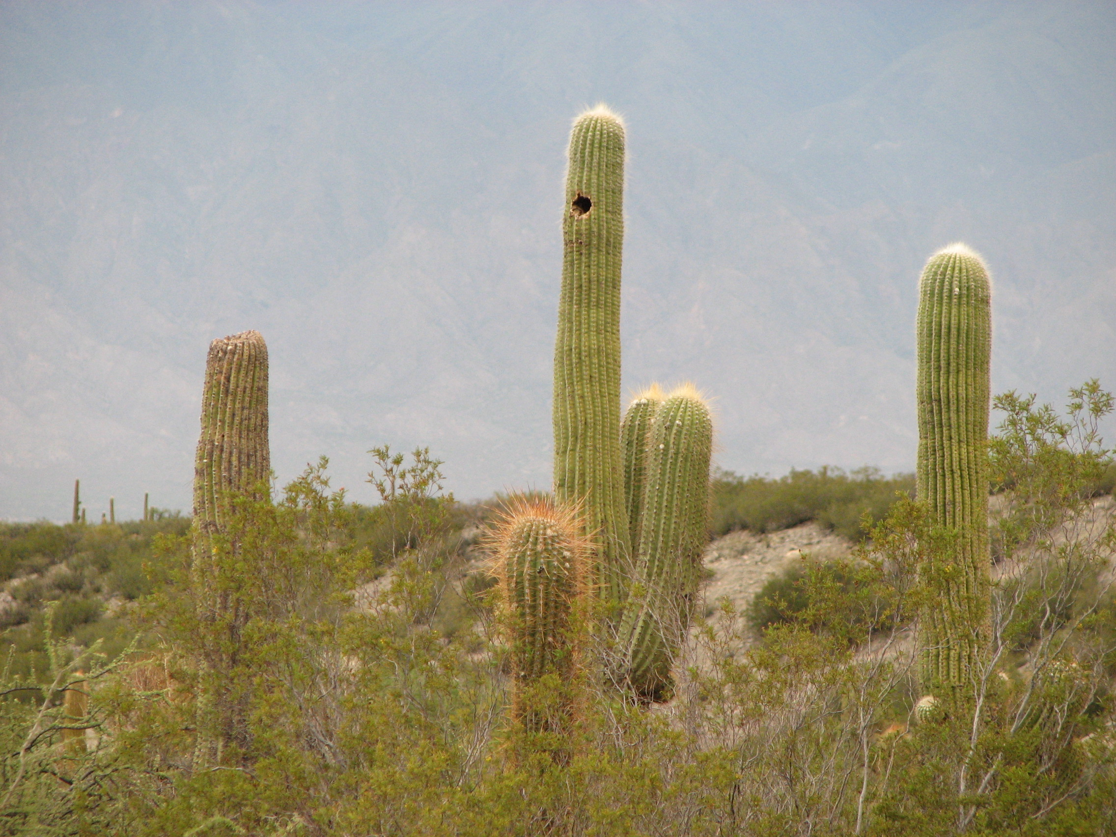 Echinopsis atacamensis subsp. pasacana